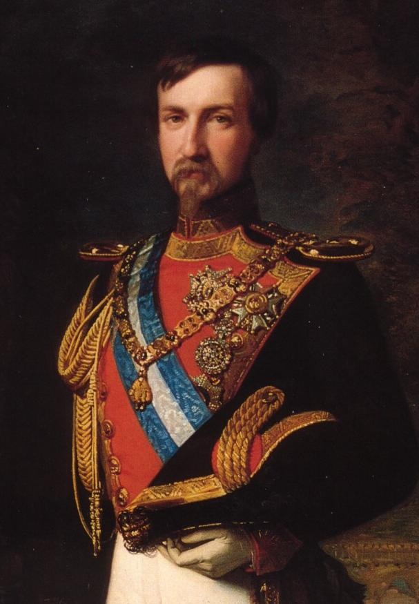 Retrato de Antonio de Orleans (1824-1890), duque de Montpensier e infante de España. Era hijo del rey Luis Felipe I de Francia y de María Amelia de Borbón-Dos Sicilias, y contrajo matrimonio con la infanta Luisa Fernanda de Borbón, hija del rey Fernando VII de España y hermana de la reina Isabel II, que concedió al duque de Montpensier el título de infante de España.